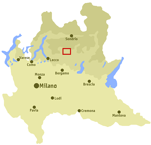 Posizione Val del Riso, Bergamo, Italia